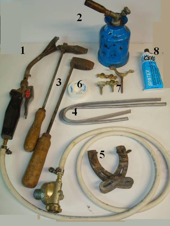 Photo de matériels de fixation de robinetterie